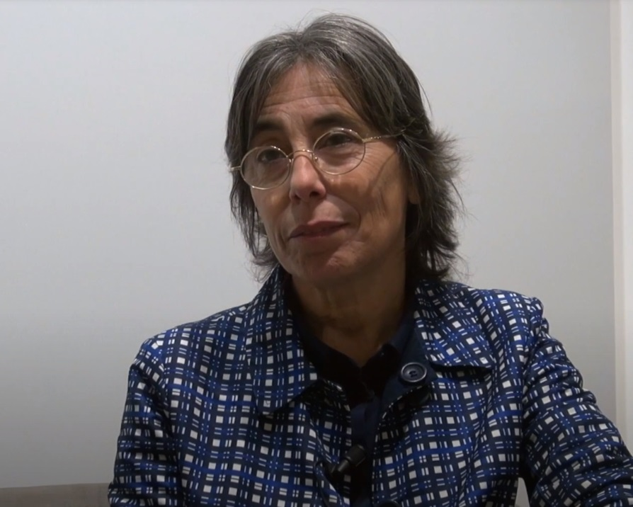 Rencontre avec Carme Pigem, à l’occasion de sa grande conférence donnée dans la grande nef de l’Entrepôt Lainé le 08 novembre.